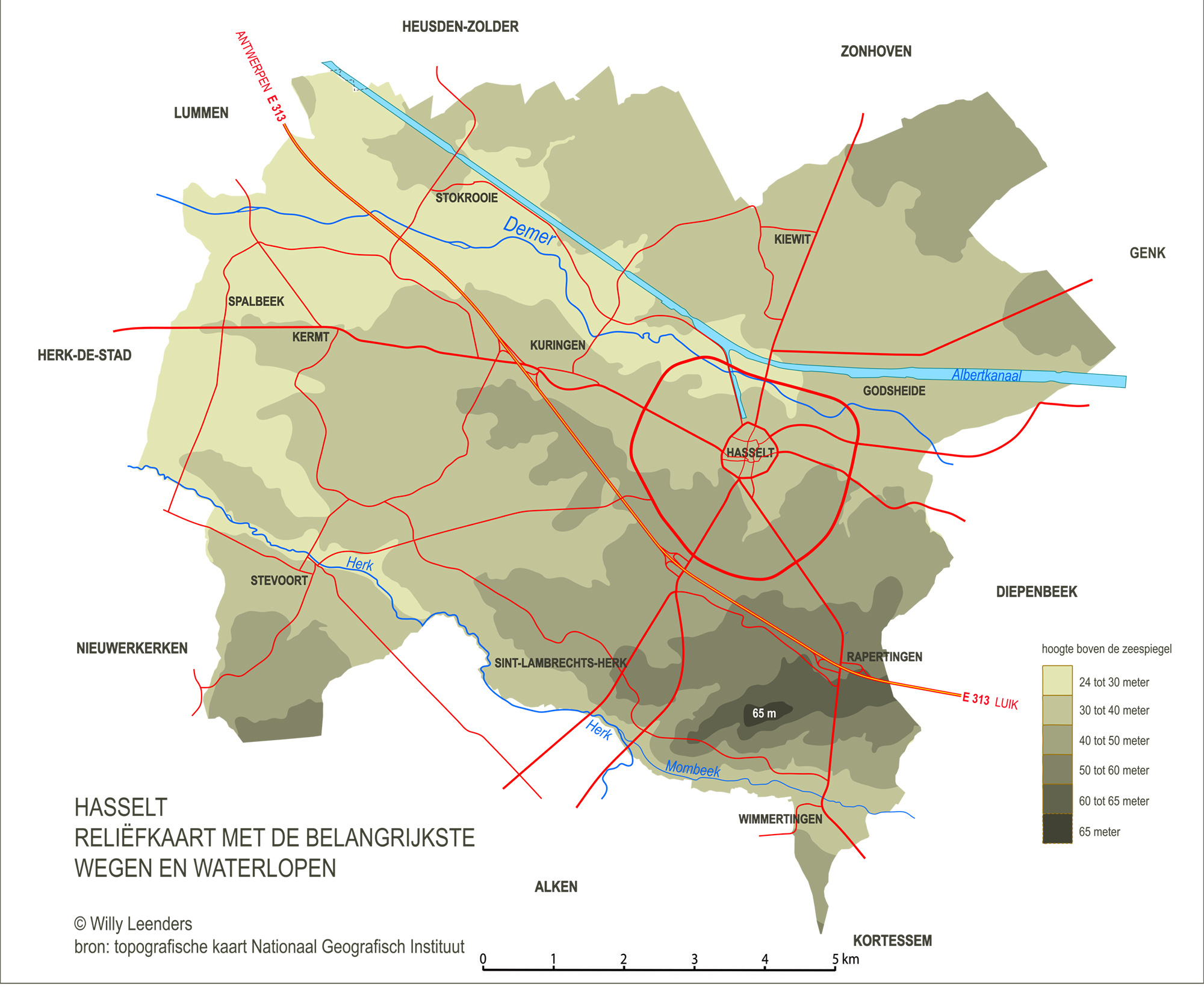 Realieëafkaart van Hasselt